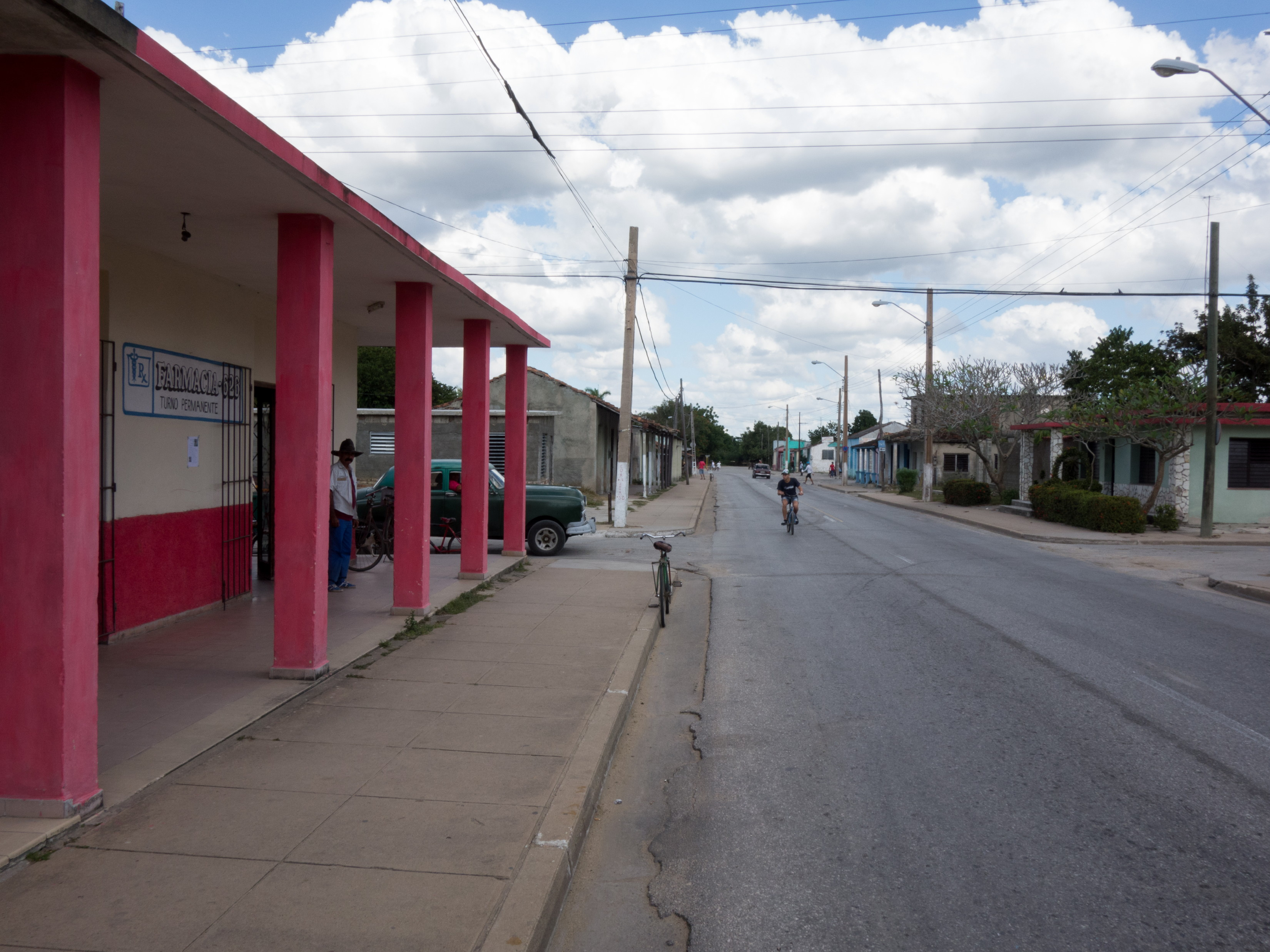 Cascorro, Provinz Camagüey, Kuba